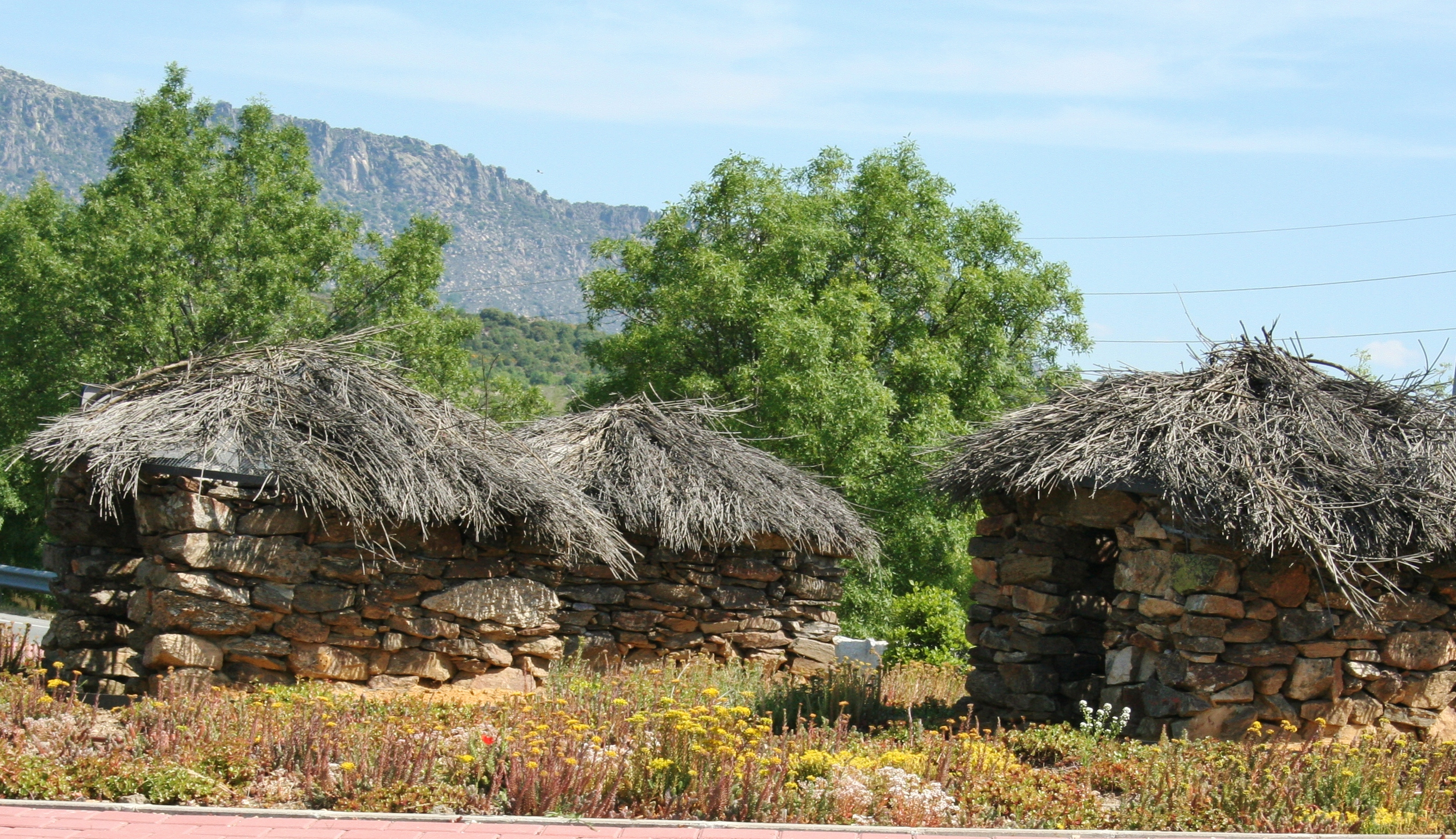 Cabañas de la rotonda de Cabanillas de la Sierra